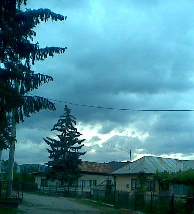 Peisaj de pe o strada a cartierului Podu Vadului din Breaza, Prahova